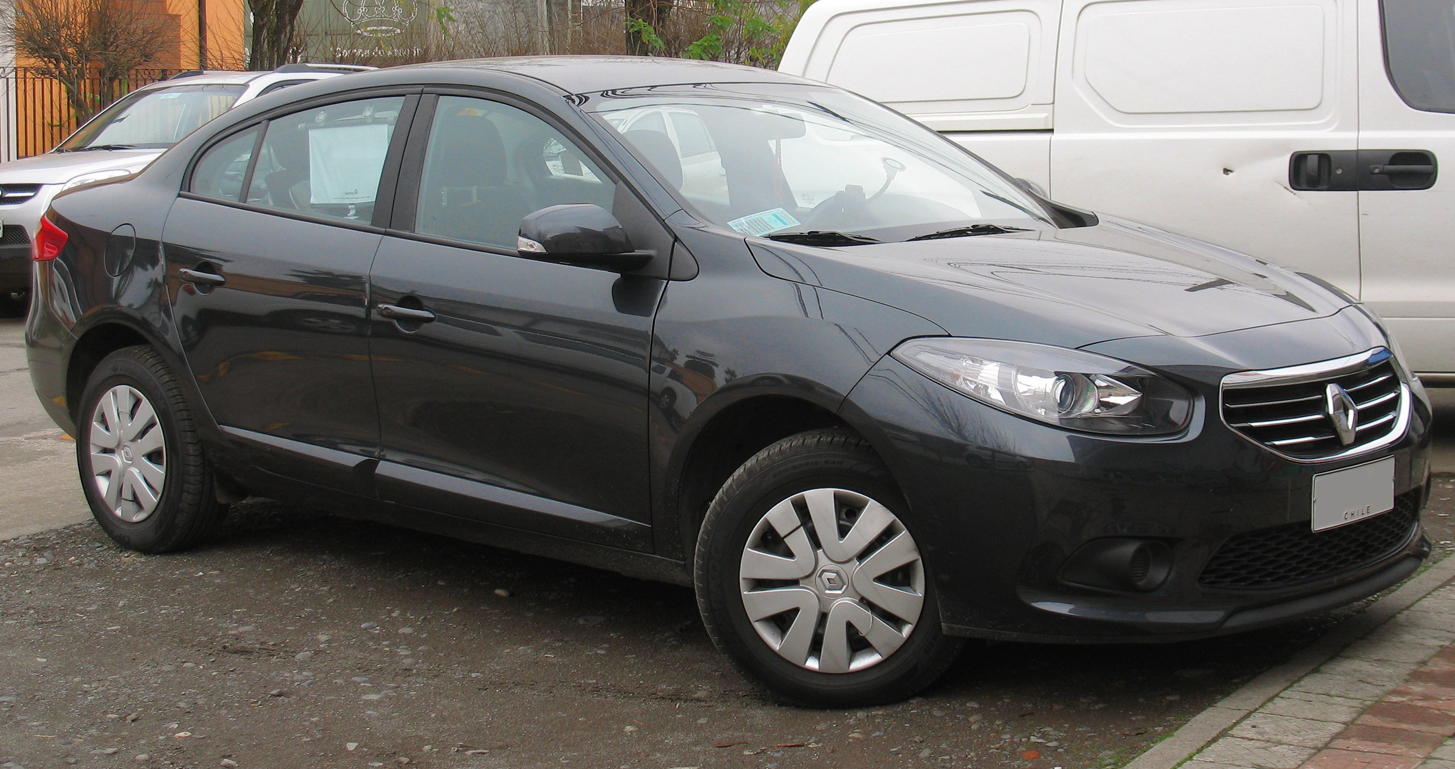 base model